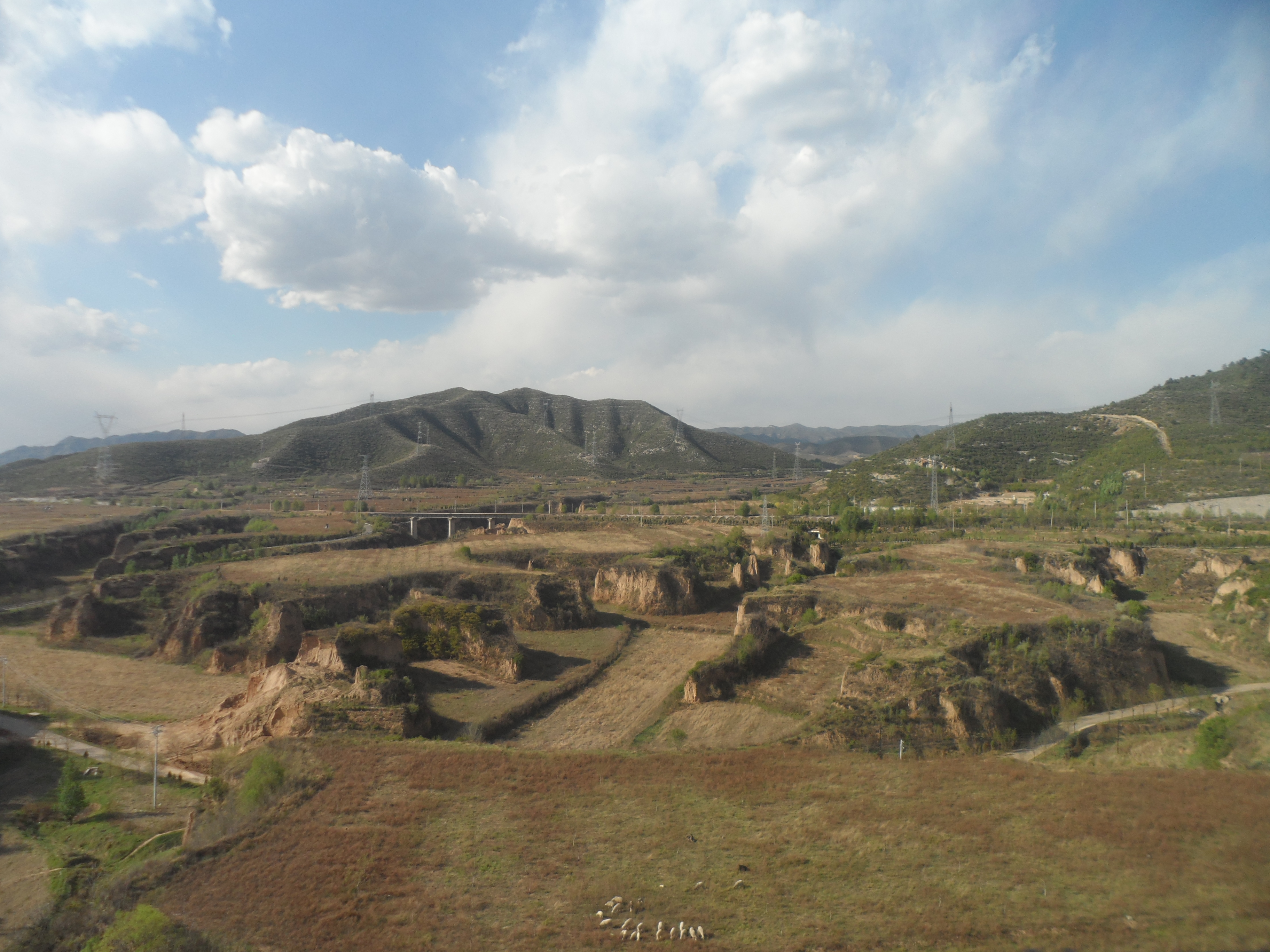 山西的地貌